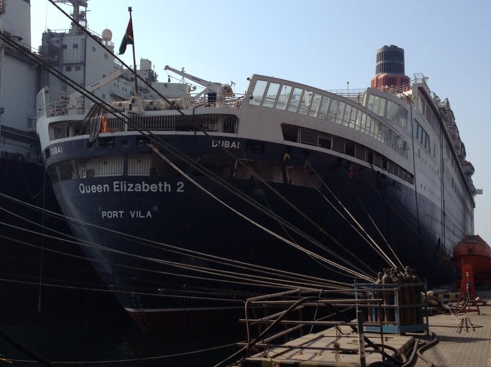 Buque en Dubai